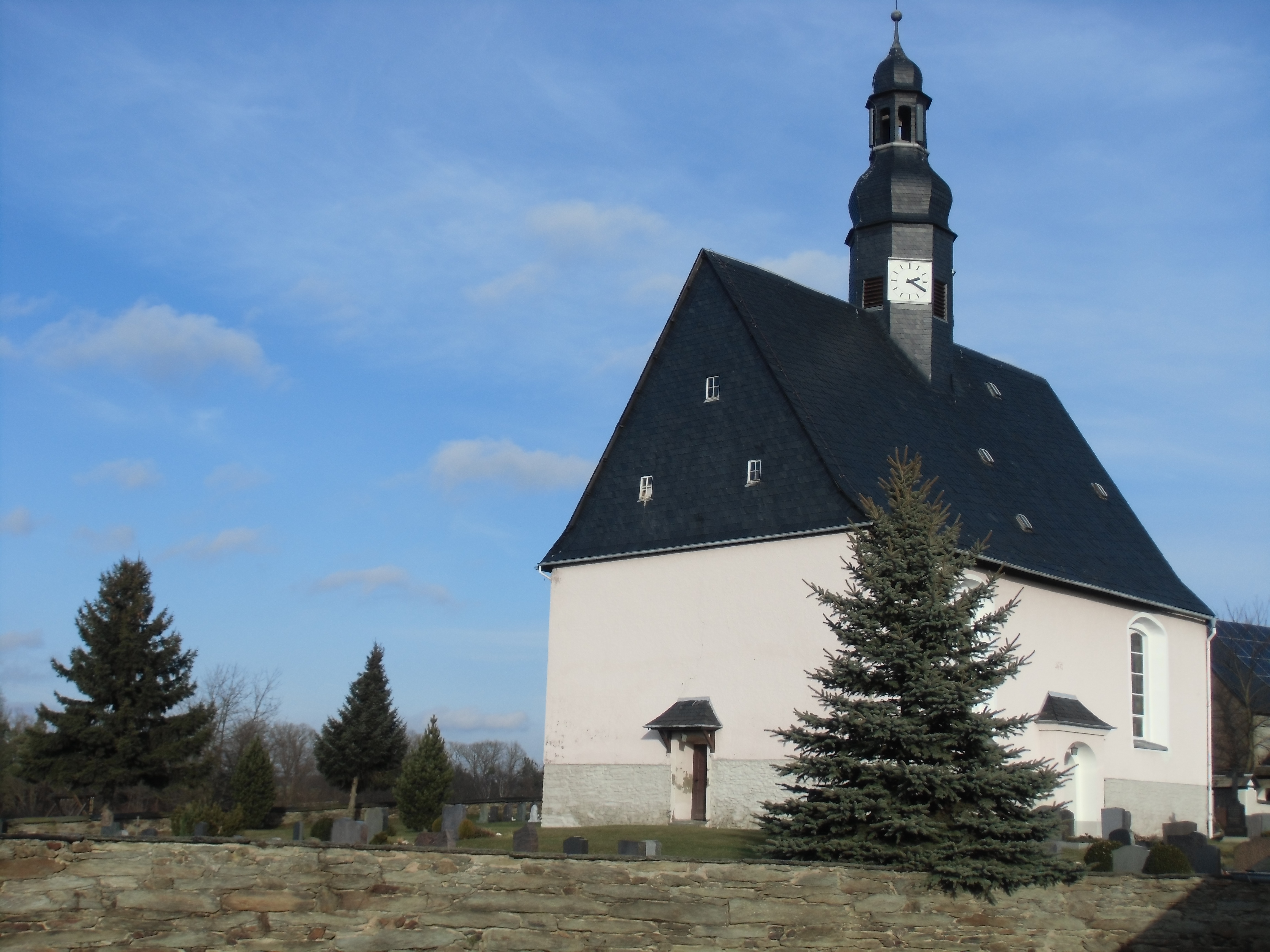 Kirche St. Urban in Naitschau, 07957 Langenwetzendorf